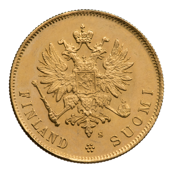 Десять марок Николая II 1913 г., монета для Финляндии, аверс. Двуглавый орёл с распростёртыми крыльями под тремя коронами; из верхней короны спускается развевающаяся Андреевская лента; на груди орла щит с гербом Великого Княжества Финляндского, окружённый цепью ордена св. Андрея Первозванного. В лапах орла скипетр и держава. Под орлом знак директора монетного двора: S (Isak Gustaf Sundell). Внизу надпись полукругом: FINLAND * SUOMI. Биткин 394